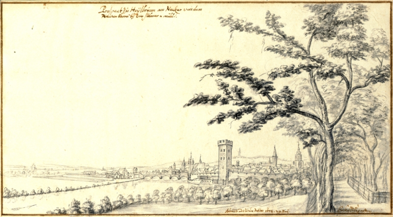 Prospect zu Heylbrunn am Neckar von dem Newen thurn bis zur Sülmer-mühl. (Heilbronn, Ansicht von Süden mit Neckar, Steinbrücke, Götzenturm). Bleistiftzeichnung, aquarelliert; 31×17 cm